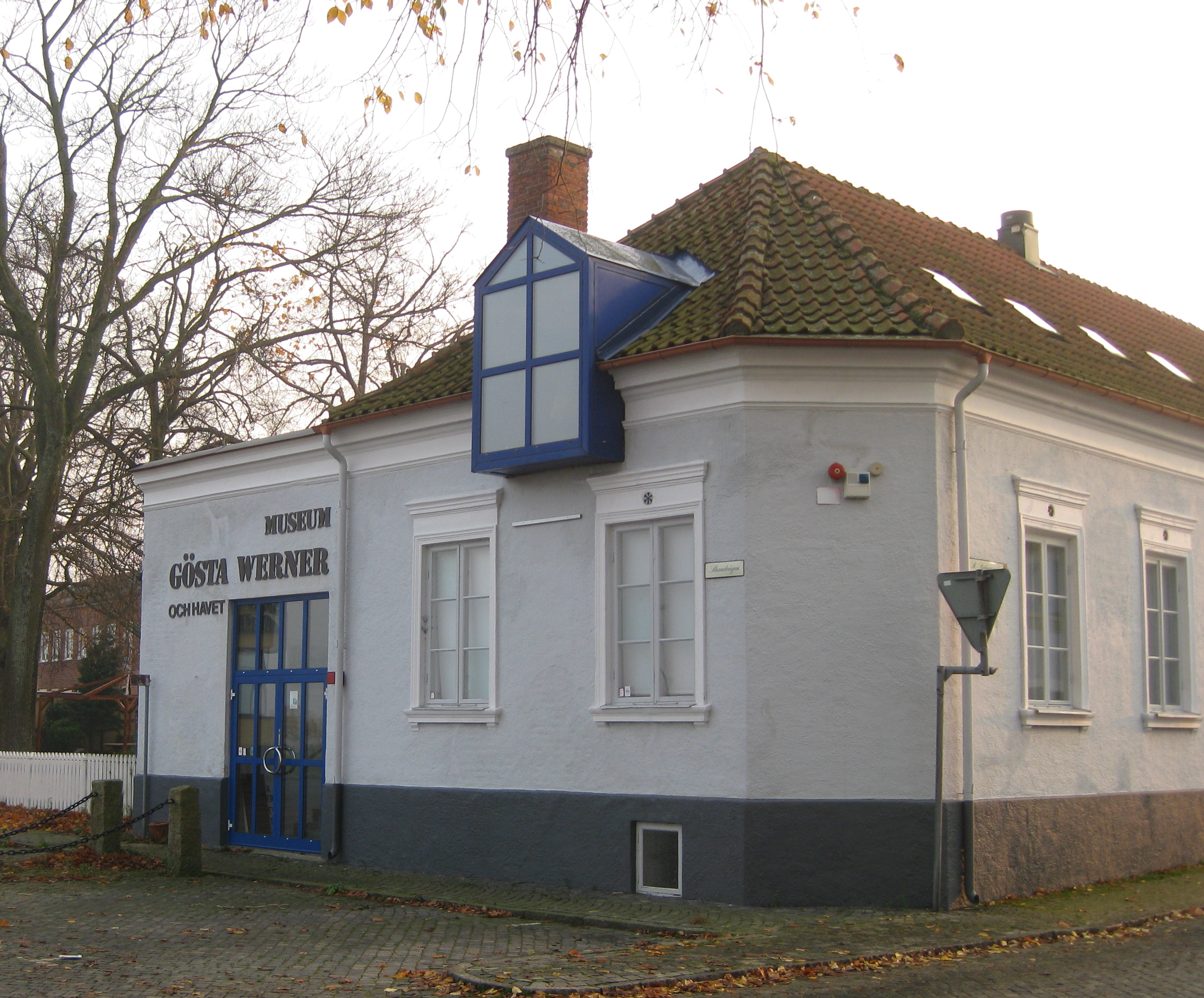 Museet Gösta Werner och Havet i Simrishamn